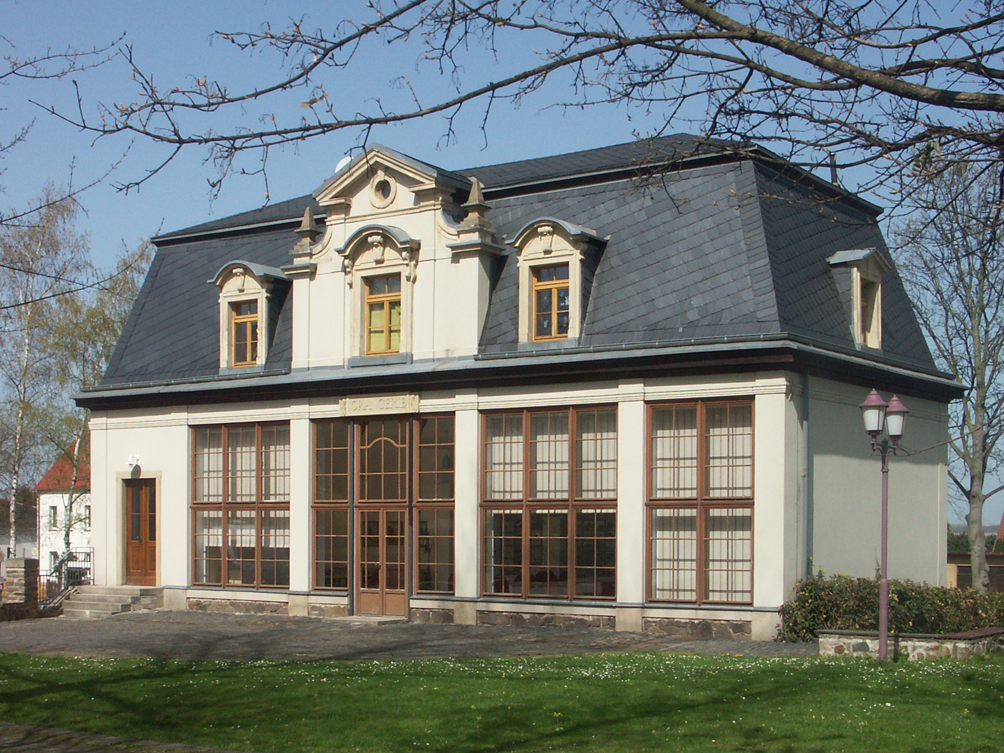 Die restaurierte Orangerie in Mölbis